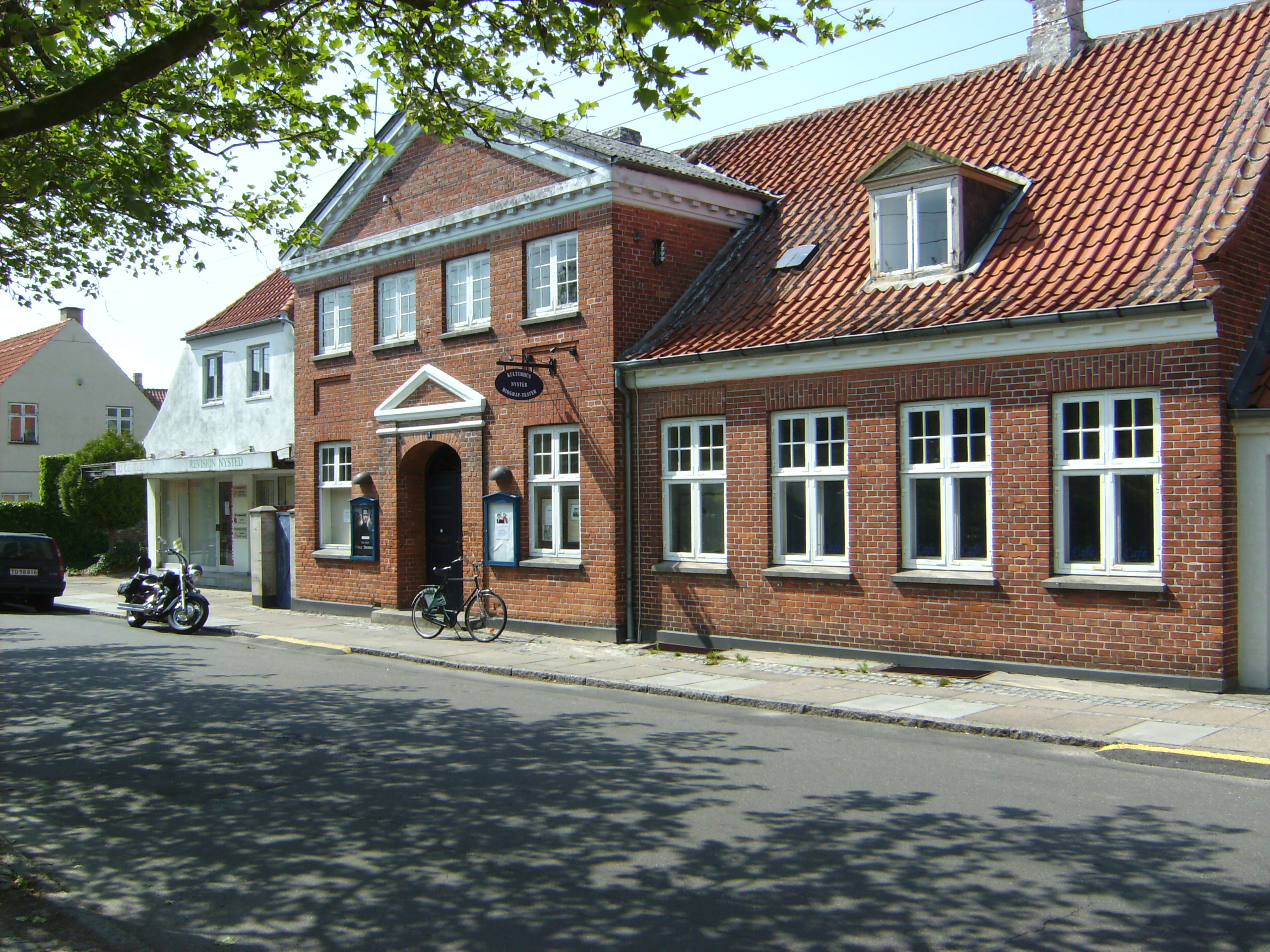 Places and houses in Nysted, Denmark Gadeprospekter og huse i Nysted, Lolland